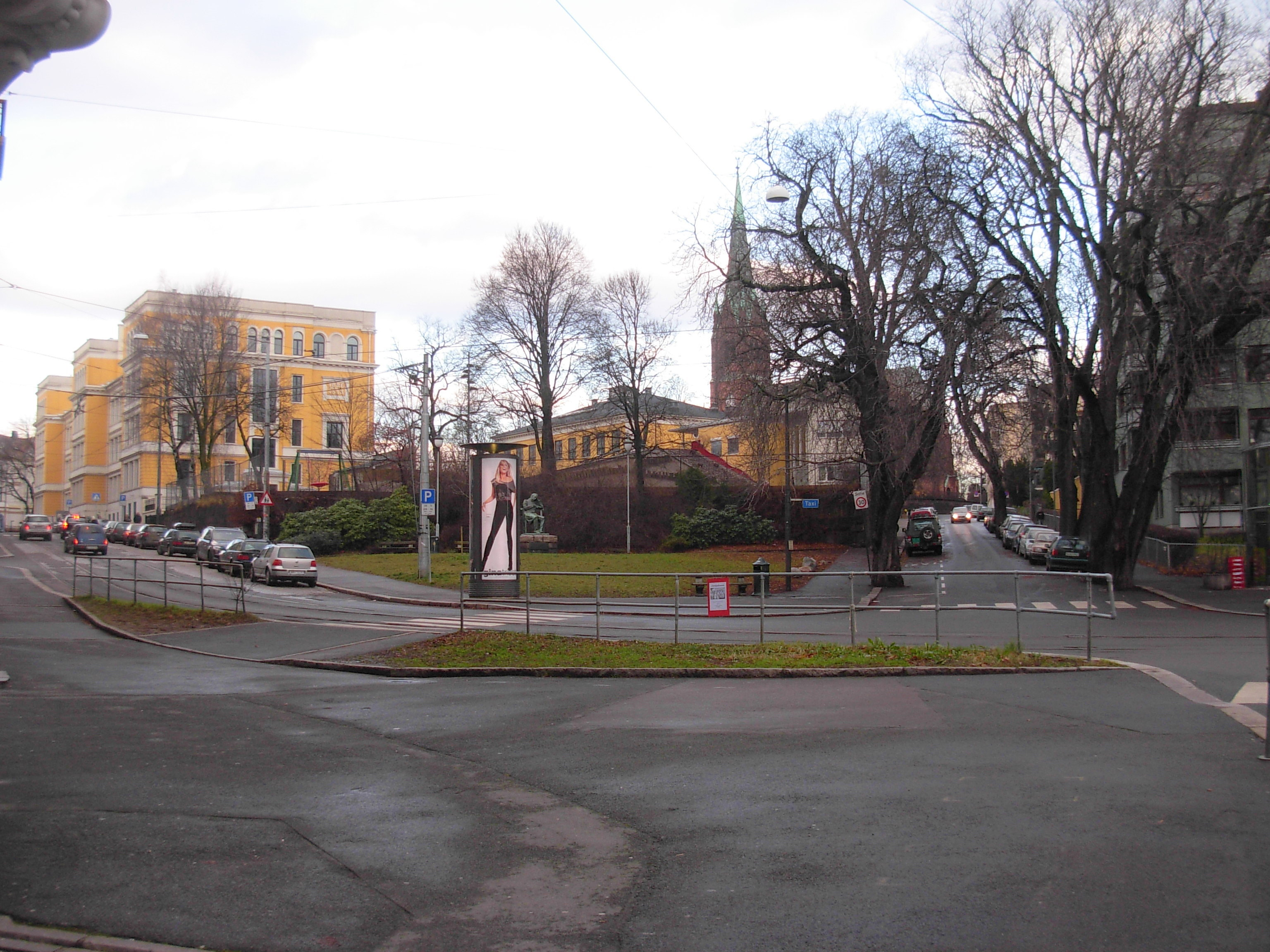 Riddervolds plass, Oslo